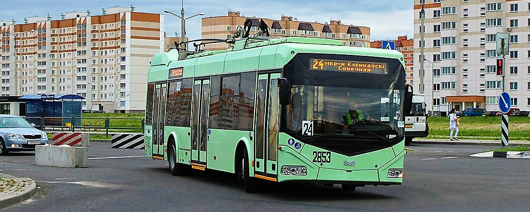 Троллейбус в Гомеле